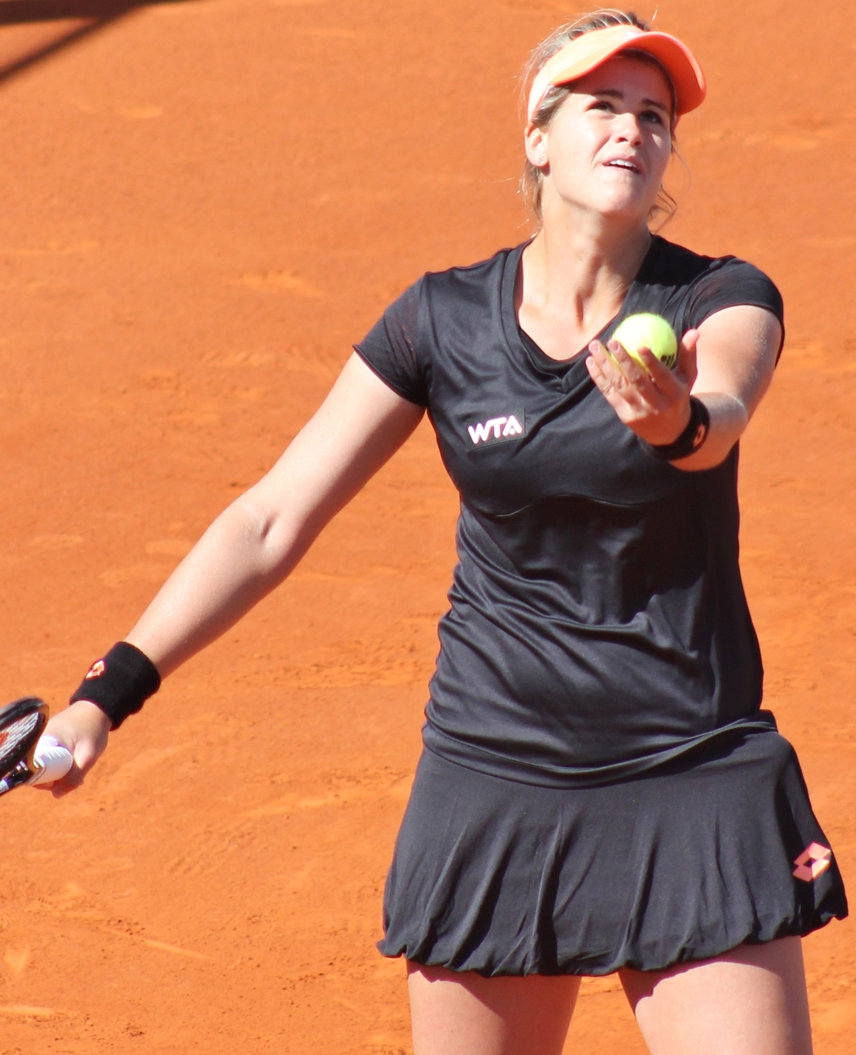 Torro Flor MA14